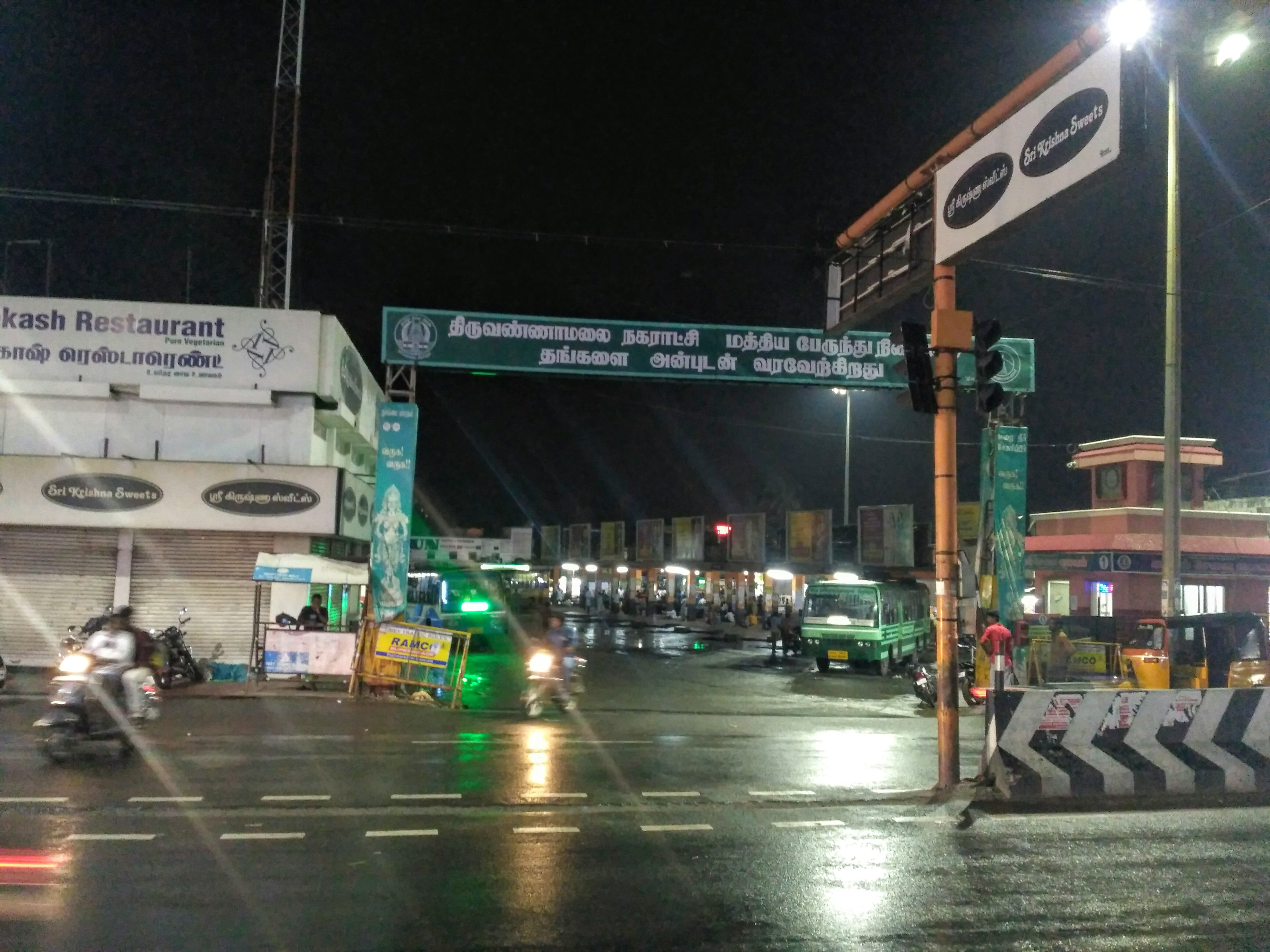 இரவு நேரத்தில் எடுக்கப்பட்ட, திருவண்ணாமலை மத்திய பேருந்து நிலையப் புகைப்படம்